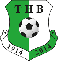 Het logo van THB